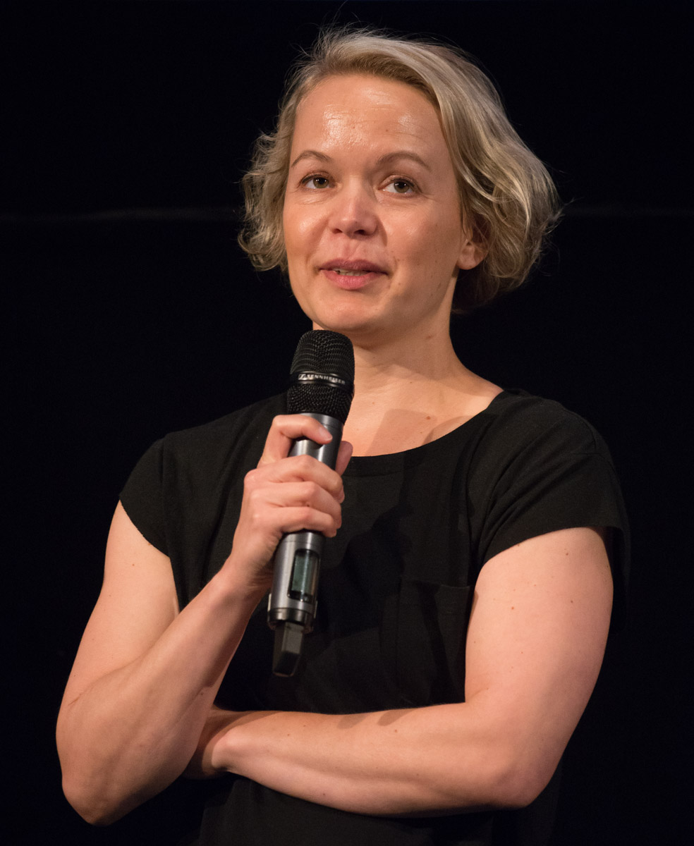 Frida Kempff under presentationen av den Svenska filmhösten i Filmhuset i Stockholm den 17 augusti 2015.